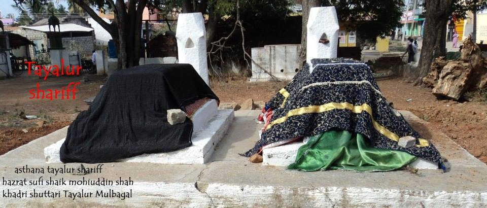 Dargah of sufi saint Hazrat shaik mohiuddin shah khadri shuttari R.A